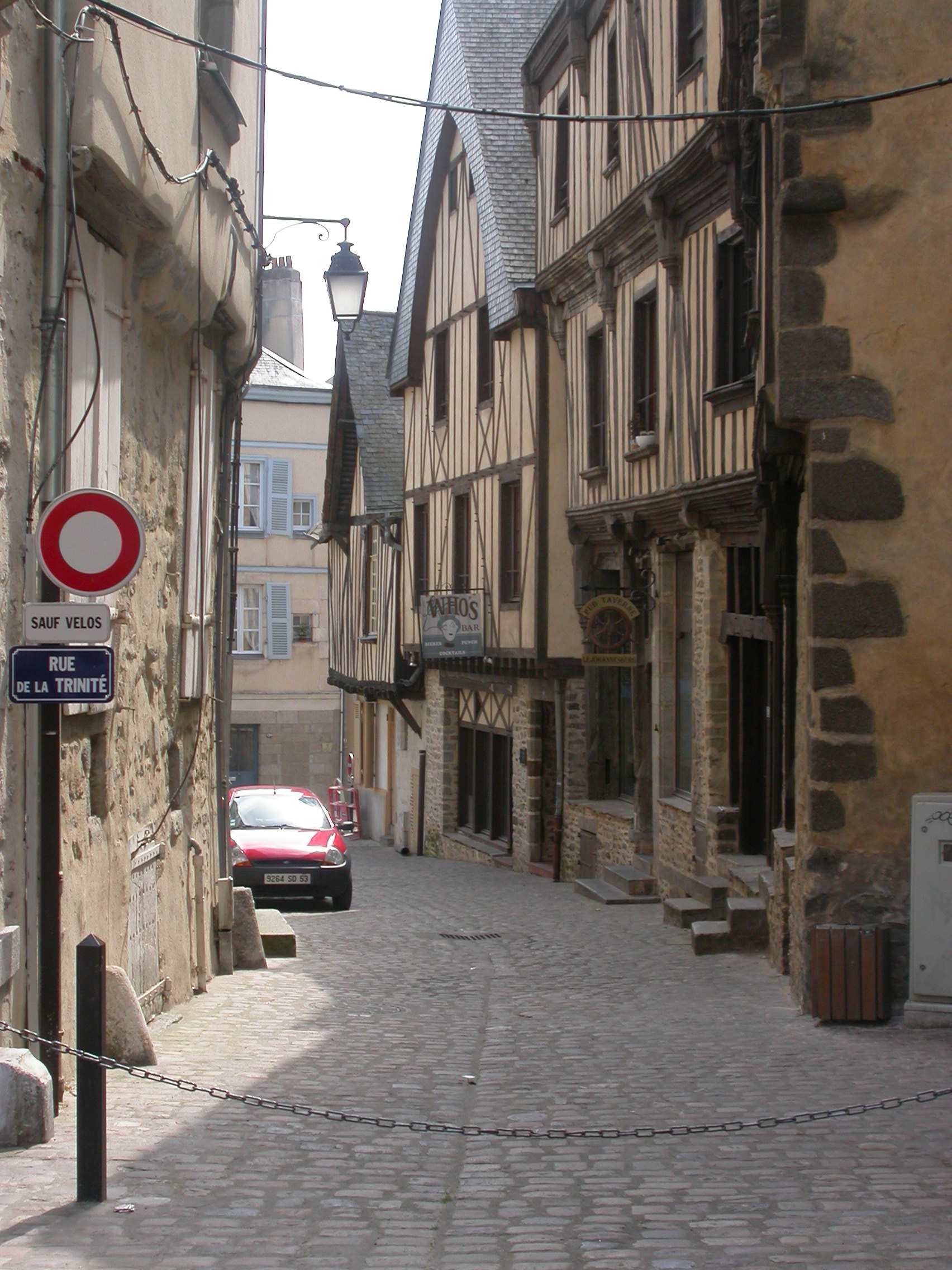 Rue de la Trinité, Laval, Mayenne, France.